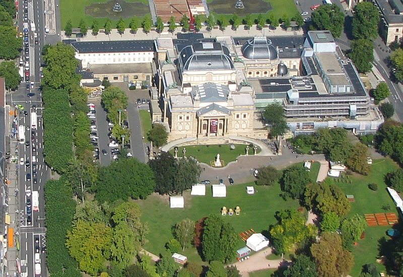 Luftbild Wiesbaden Hessisches Staatstheater an der Wilhelmstraße Schillerdenkmal Park am Warmen Damm Foto 2008 Wolfgang Pehlemann Wiesbaden IMG_0130